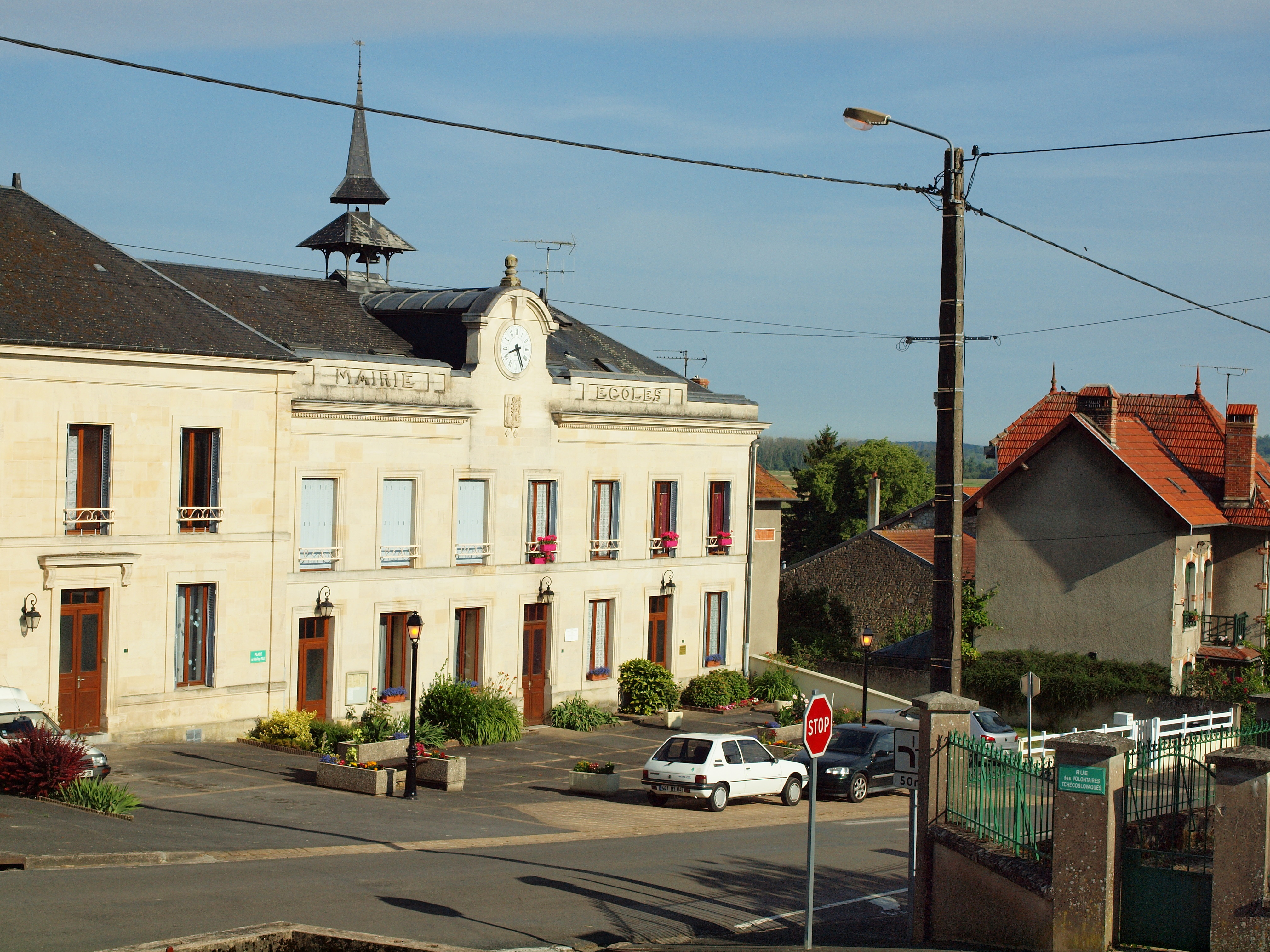 Vandy (Ardennes, France)